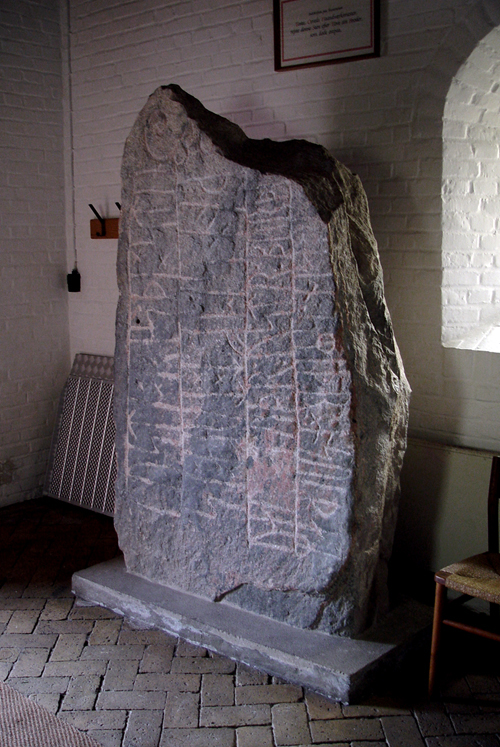 Runestone in Kolind, Denmark. (DR 108)